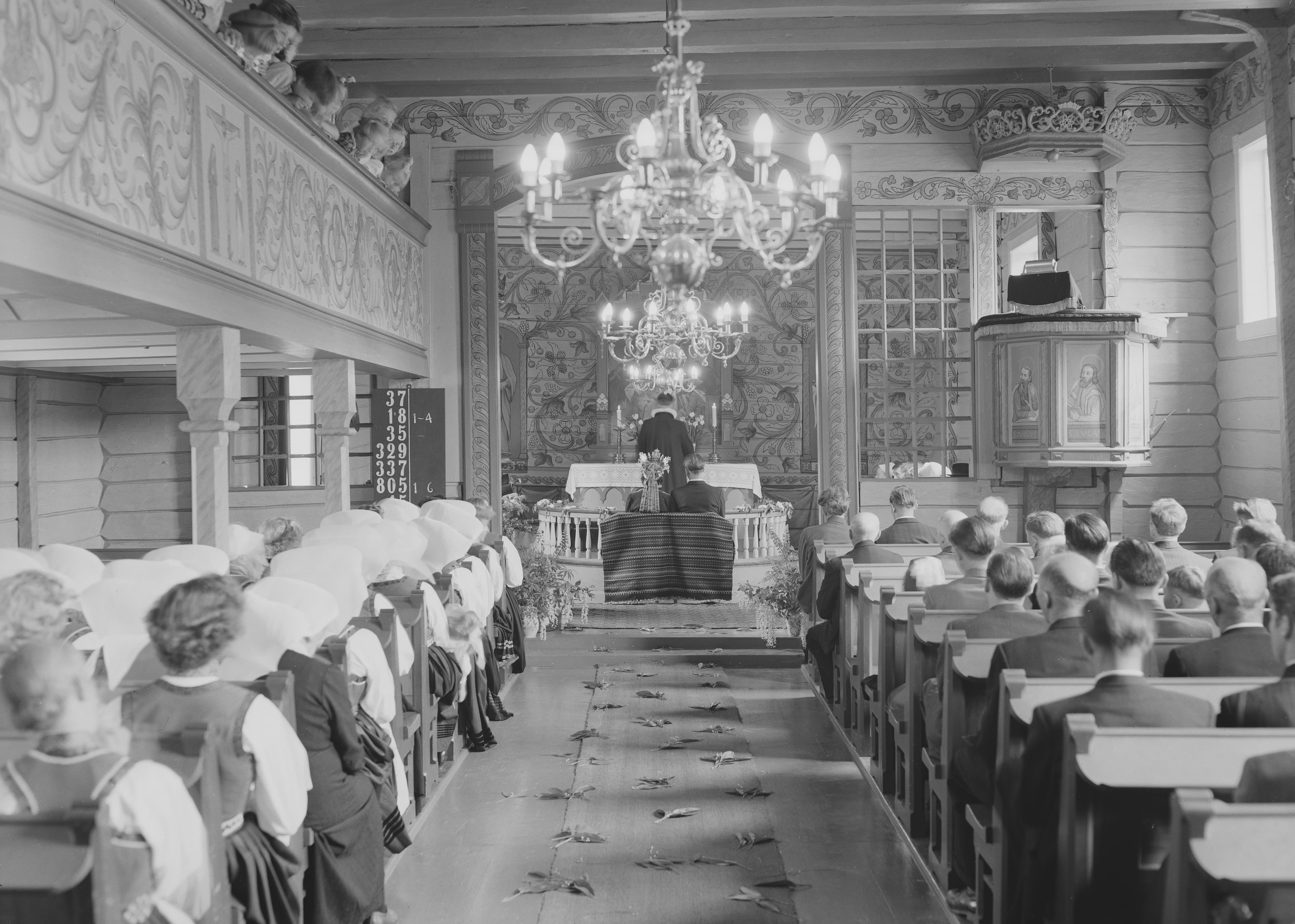 Bildet er hentet fra Nasjonalbibliotekets bildesamling. Anmerkninger til bildet var: Fotograf : ukjent Granvin, Granvin, Hordaland